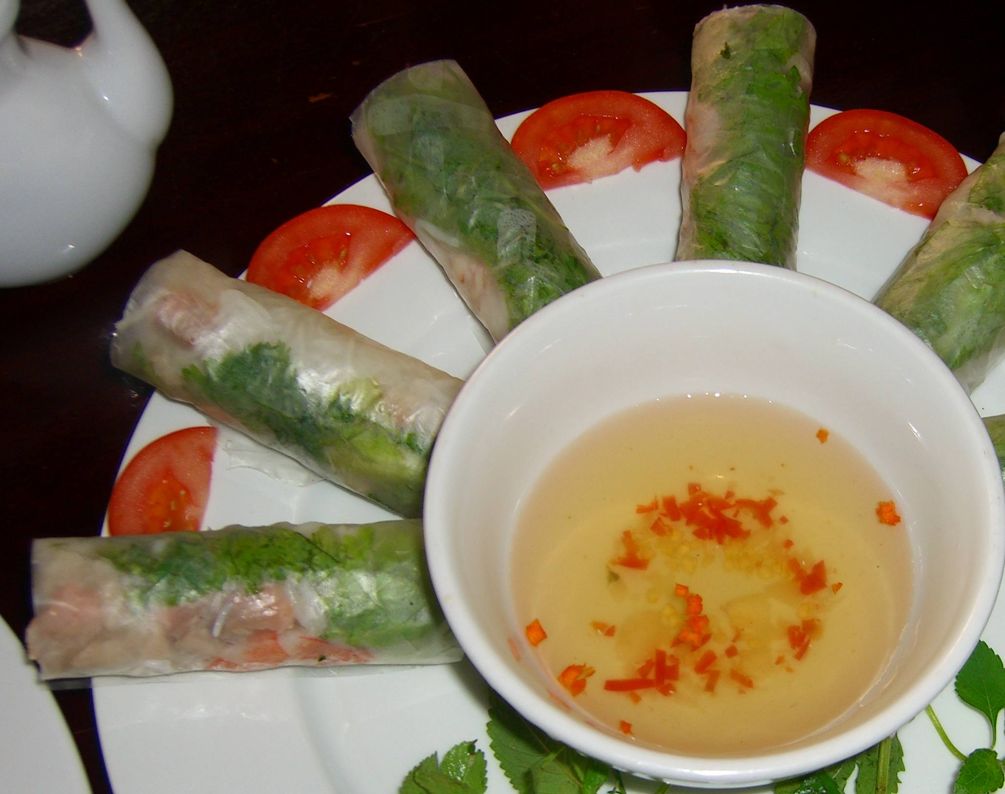 unfritierte Frühlingsrollen mit Dip, selbst fotografiert in einem Restaurant in Hanoi, Vietnam, Oktober 2005